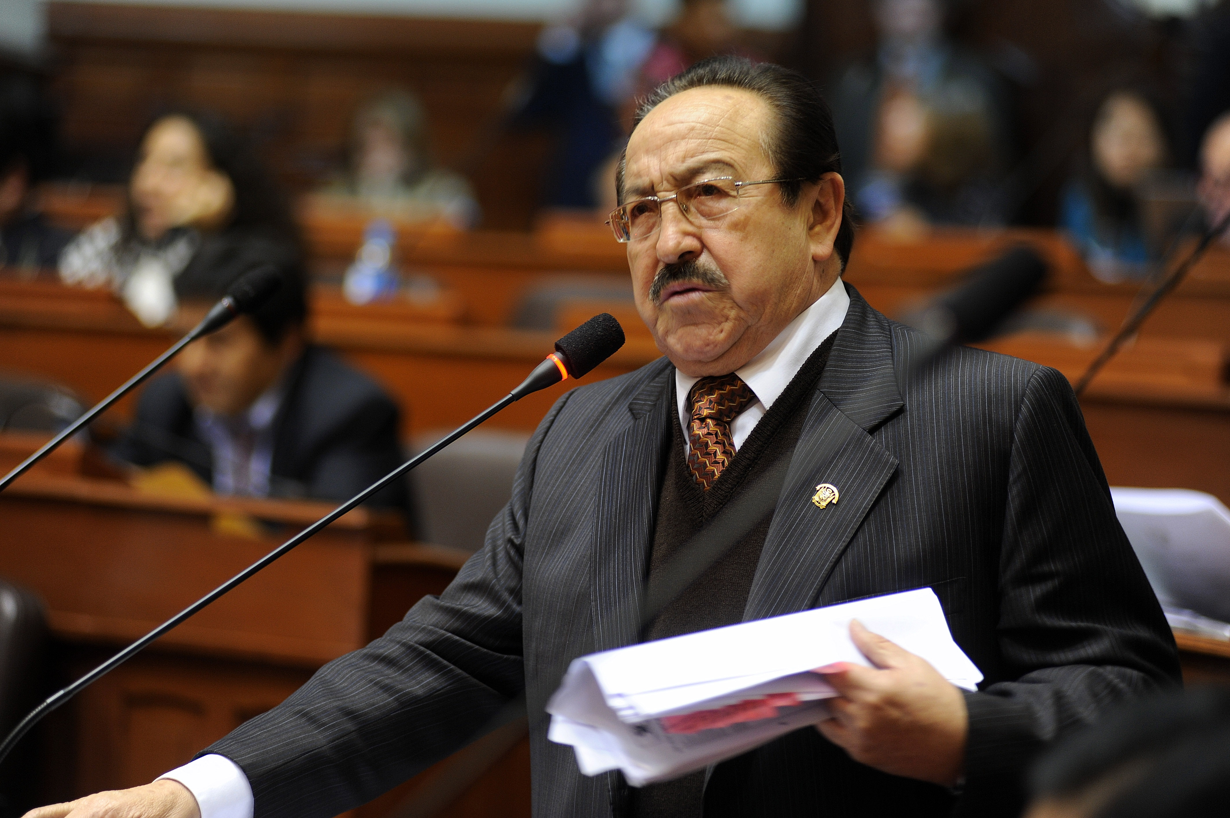 El legislador Víctor Mayorga expresa su posición en el debate parlamentario realizado esta mañana por el Pleno congresal.